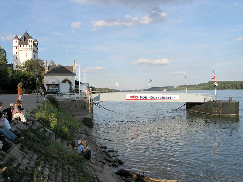 Eltville, Rheingau, Deutschland (Germany), Schiffsanleger und Kurfürstliche Burg